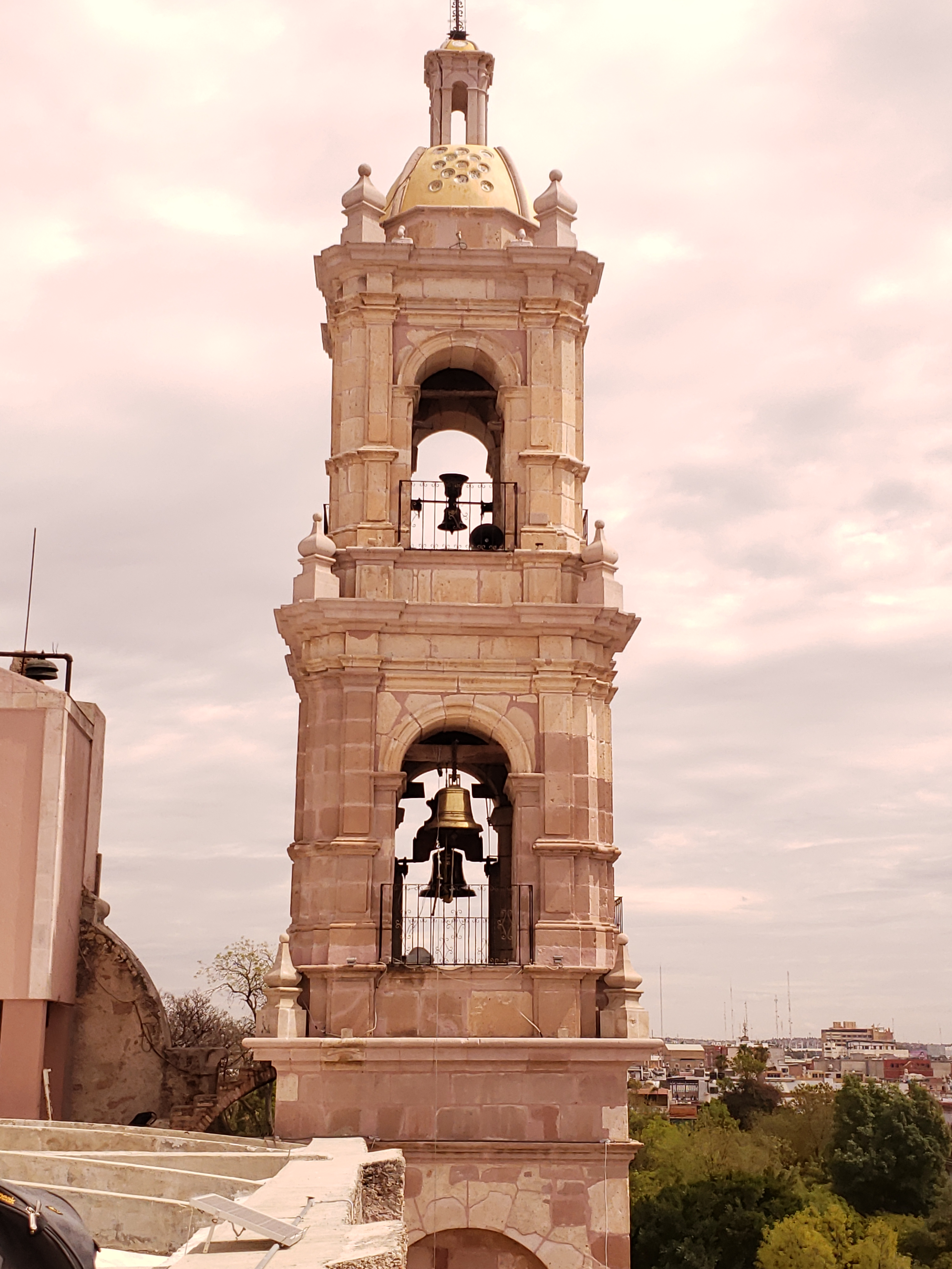 Foto de la torre campanario sur del templo de San Marcos en Aguascalientes